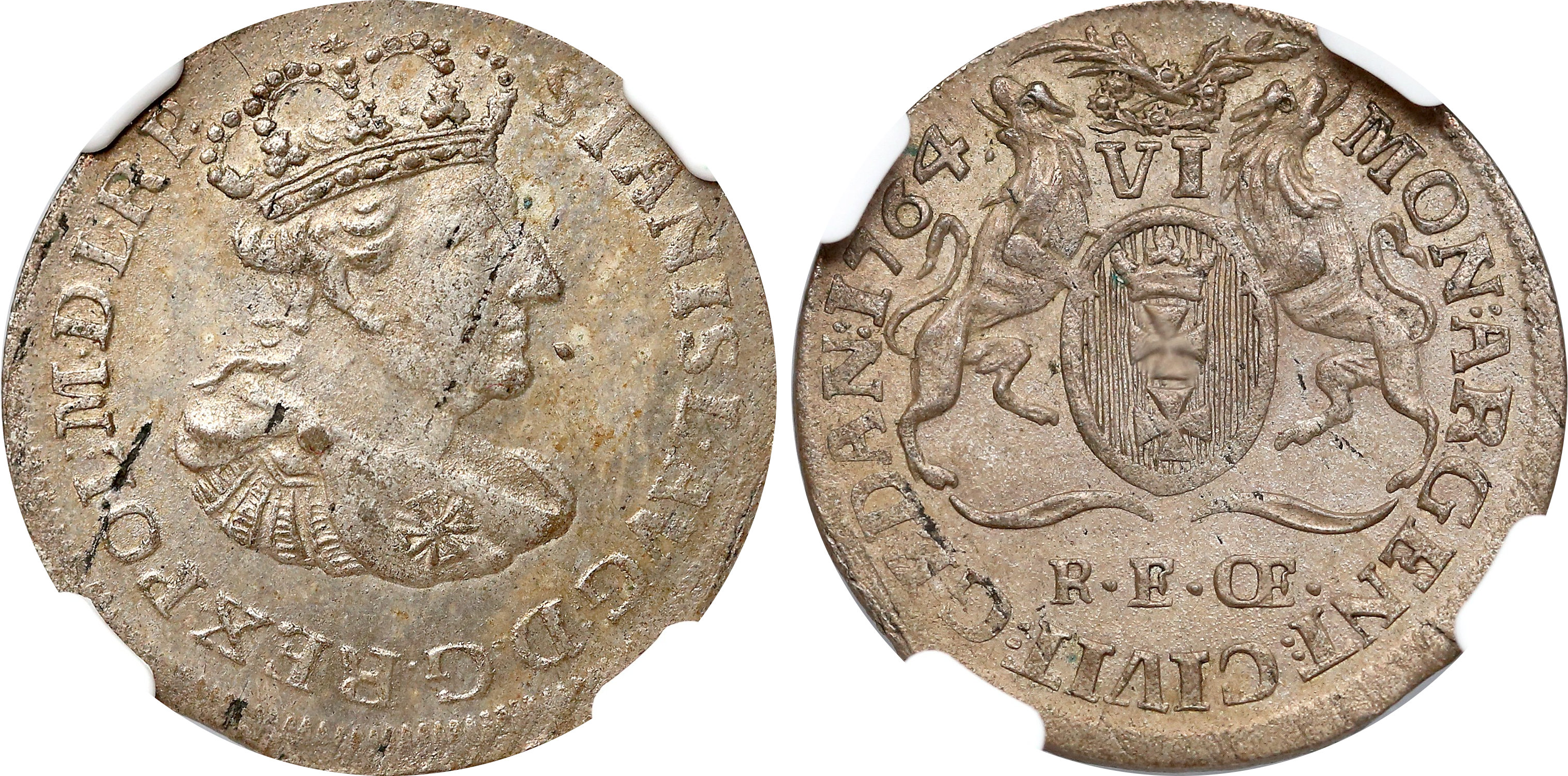 Szóstak miejski Gdańsk 1764